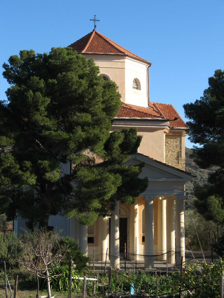 Santuario del Carmine, Frazione di Costa d'Oneglia, Imperia, Italy